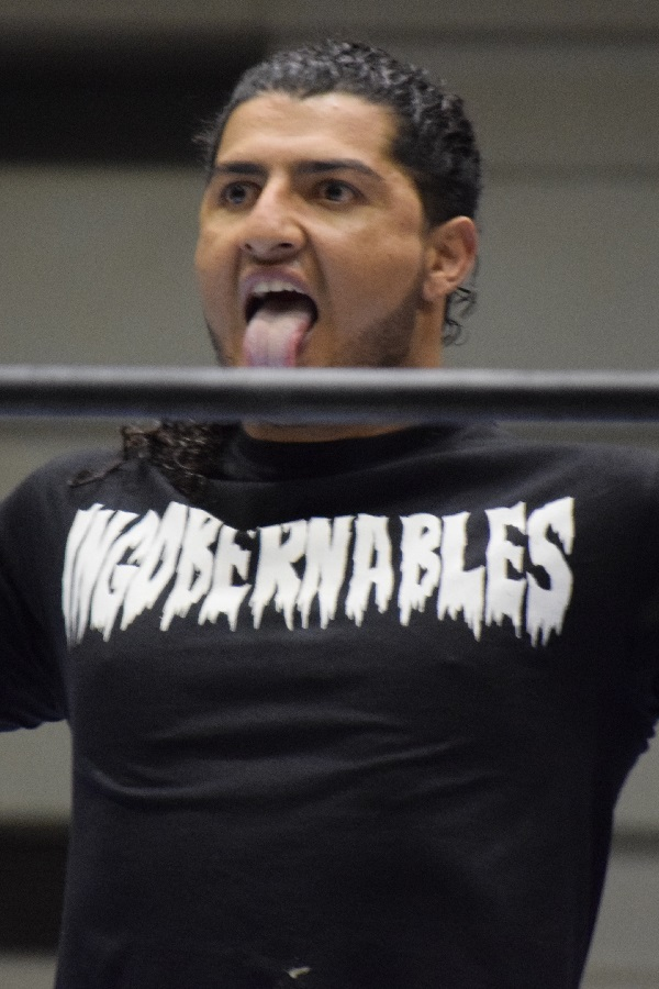 2017年1月13日 大阪府立体育会館・第二競技場「CMLL FANTASTICA MANIA 2017」 ルーシュ